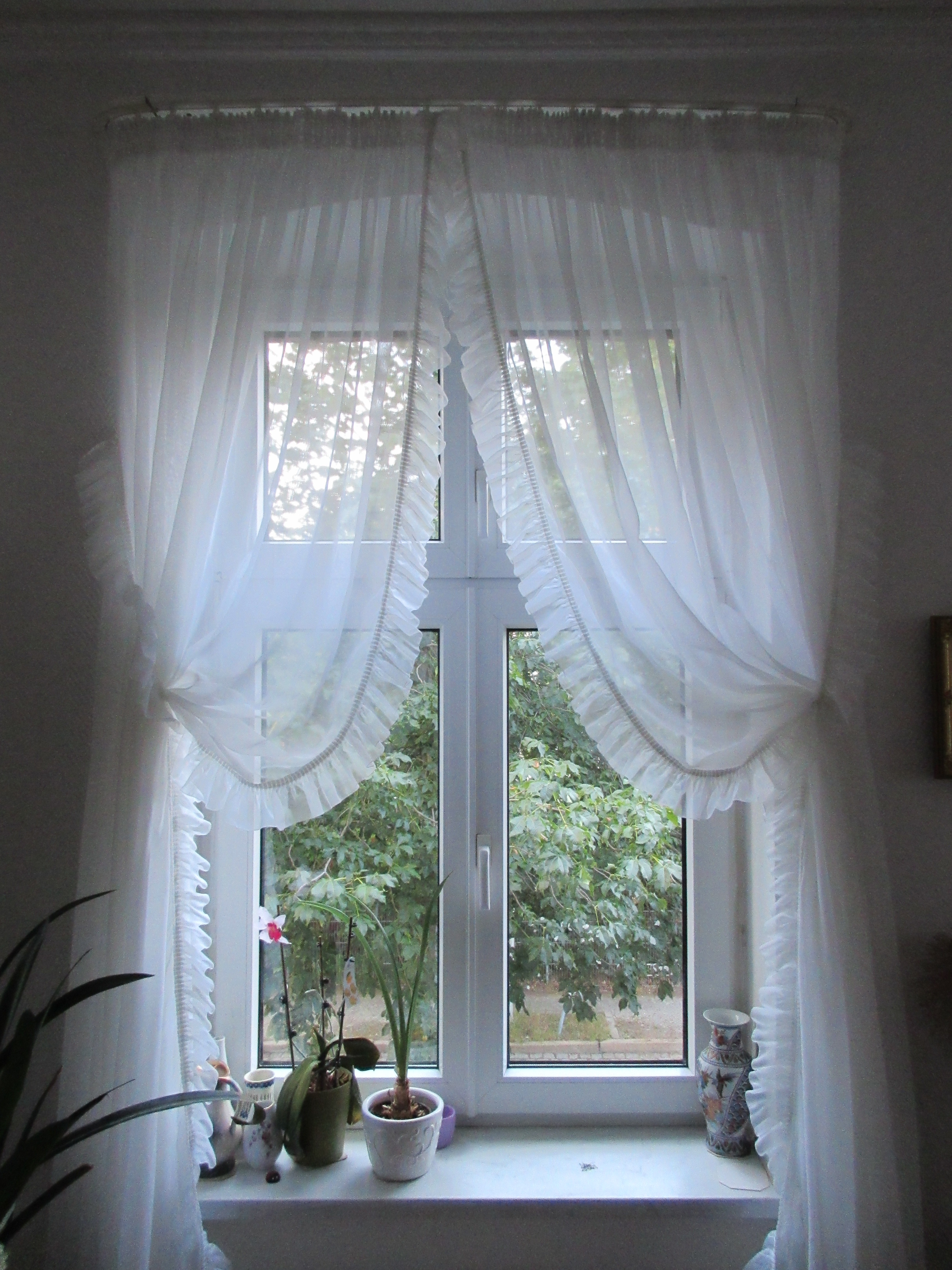 EIn Bild einer Raffgardine.